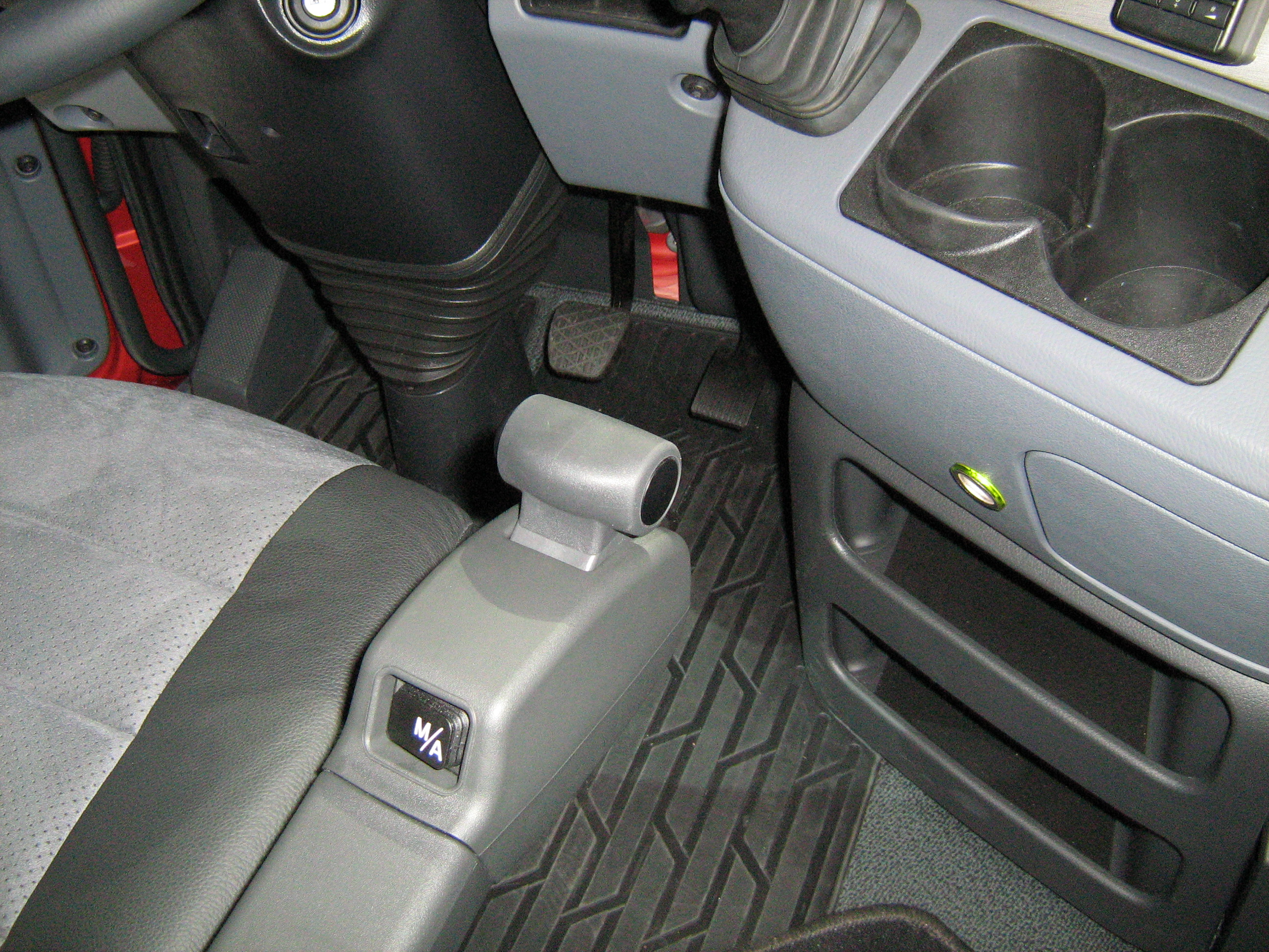 Mercedes LKW PowerShift 2 mit Schaltautomatik Hebel auf klappbarer Konsole 2008